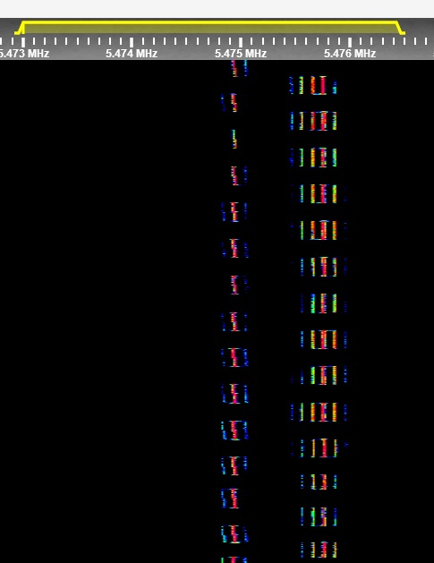 Squeaky Wheel-Channel marker in der Waterfall-Ansicht eines KiwiSDRs